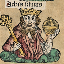 Зображення Атіса Сільвія у Нюрнберзькій хрониці.